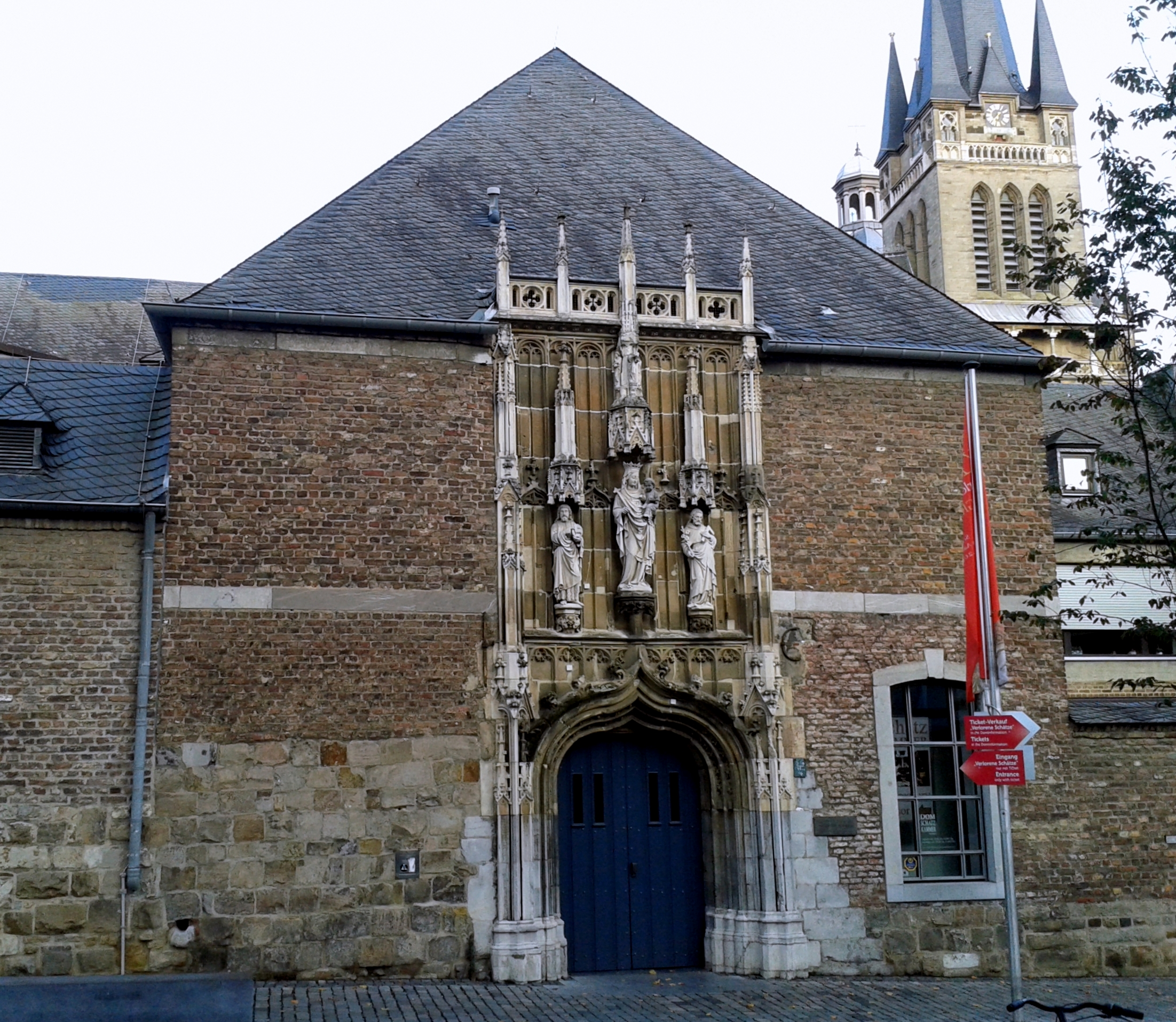 Haupteingang Aachener Domschatzkammer, so genanntes "Kleines Drachenloch"